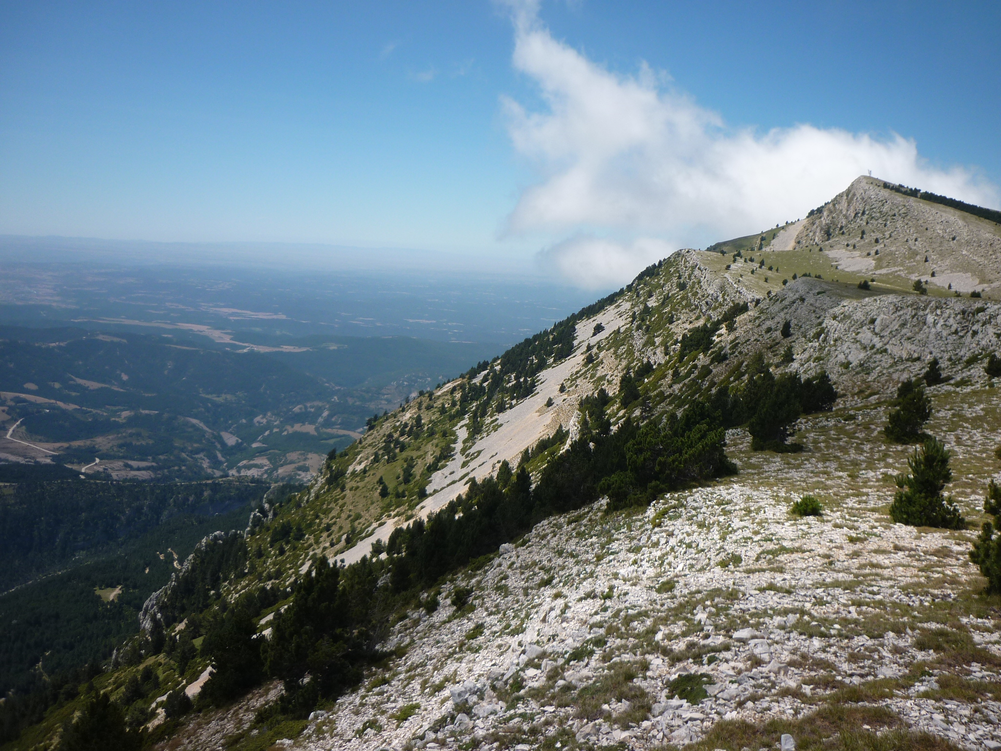 Des de la carena, el Feixar s'enfonsa sobre la Vall de Lord